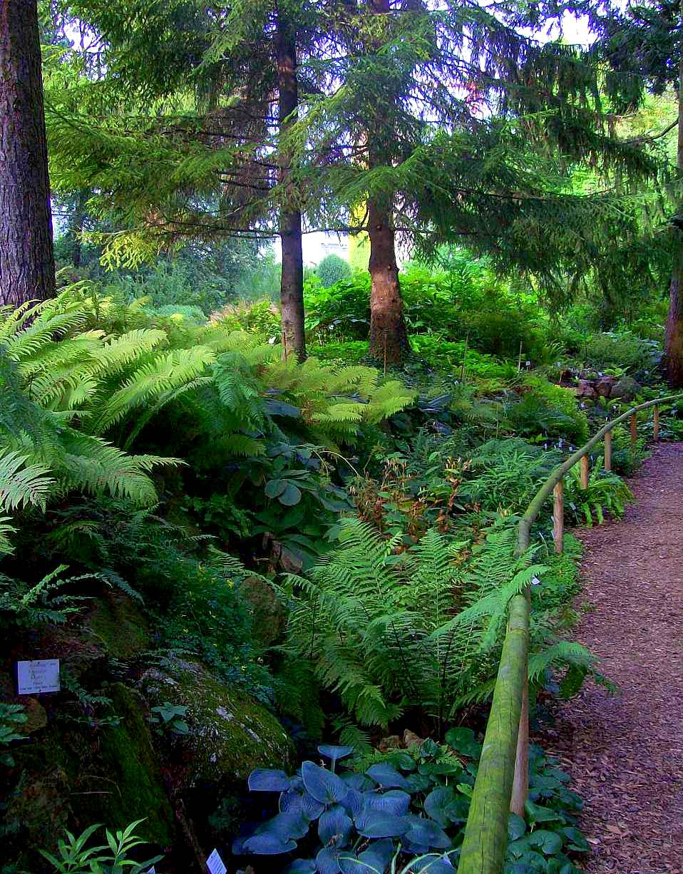 Fern ravine (de: Farnschlucht) in the botanical garden of the University Heidelberg.